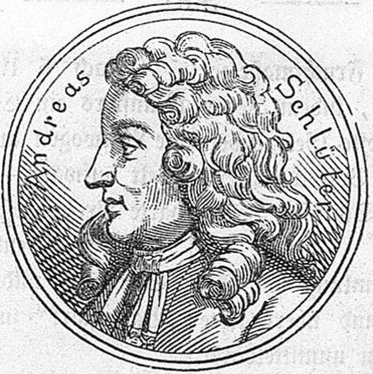 Bildnis Andreas Schlüter (1662–1714)